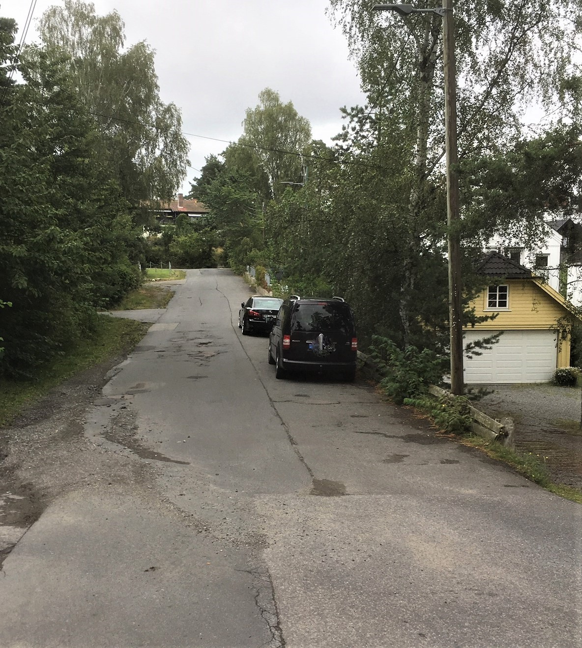 Torsborgveien i Oslo august 2019